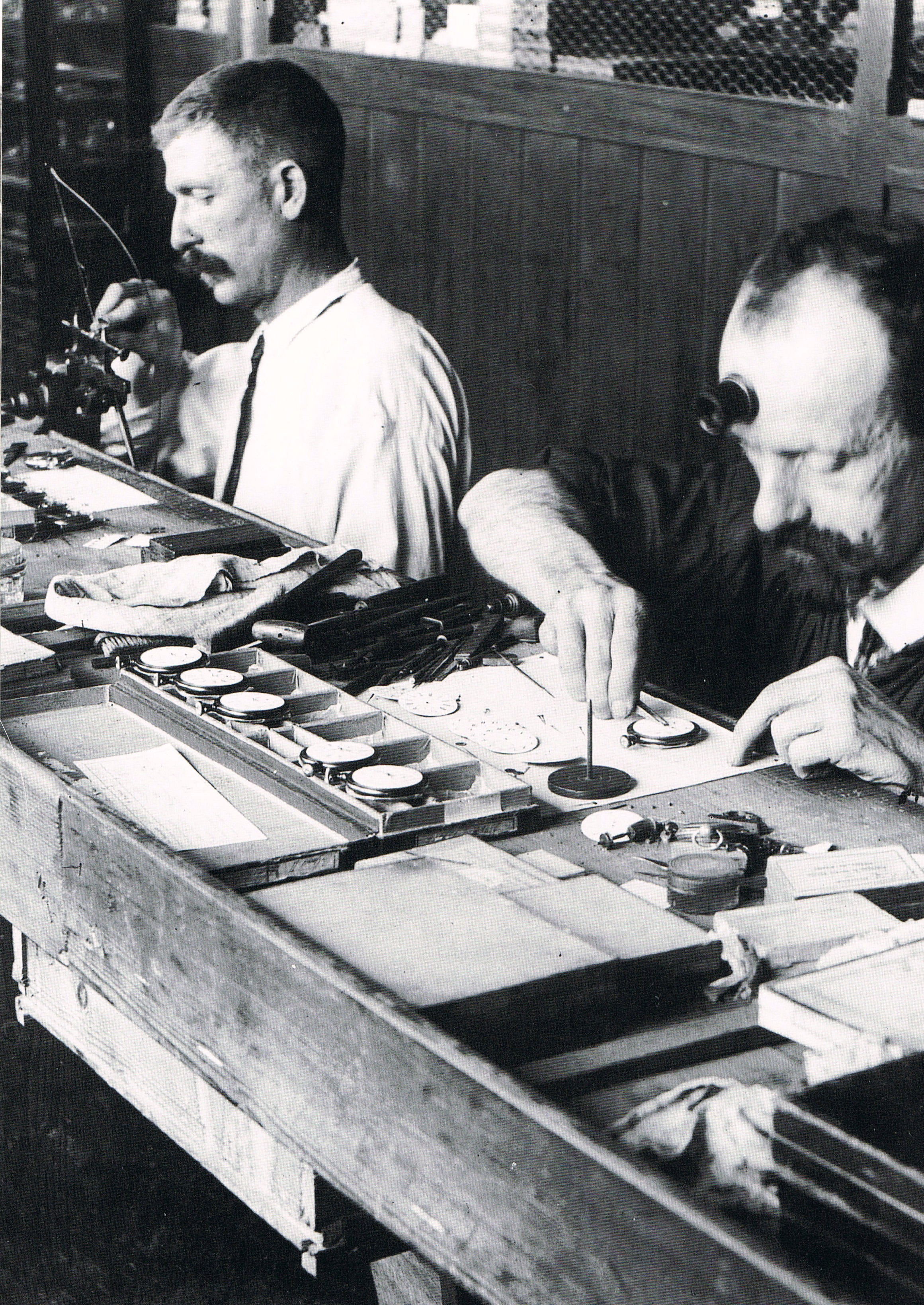 Un ouvrier horloger posant les cadrans et les aiguilles d'une montre, à Besançon (Doubs, France).